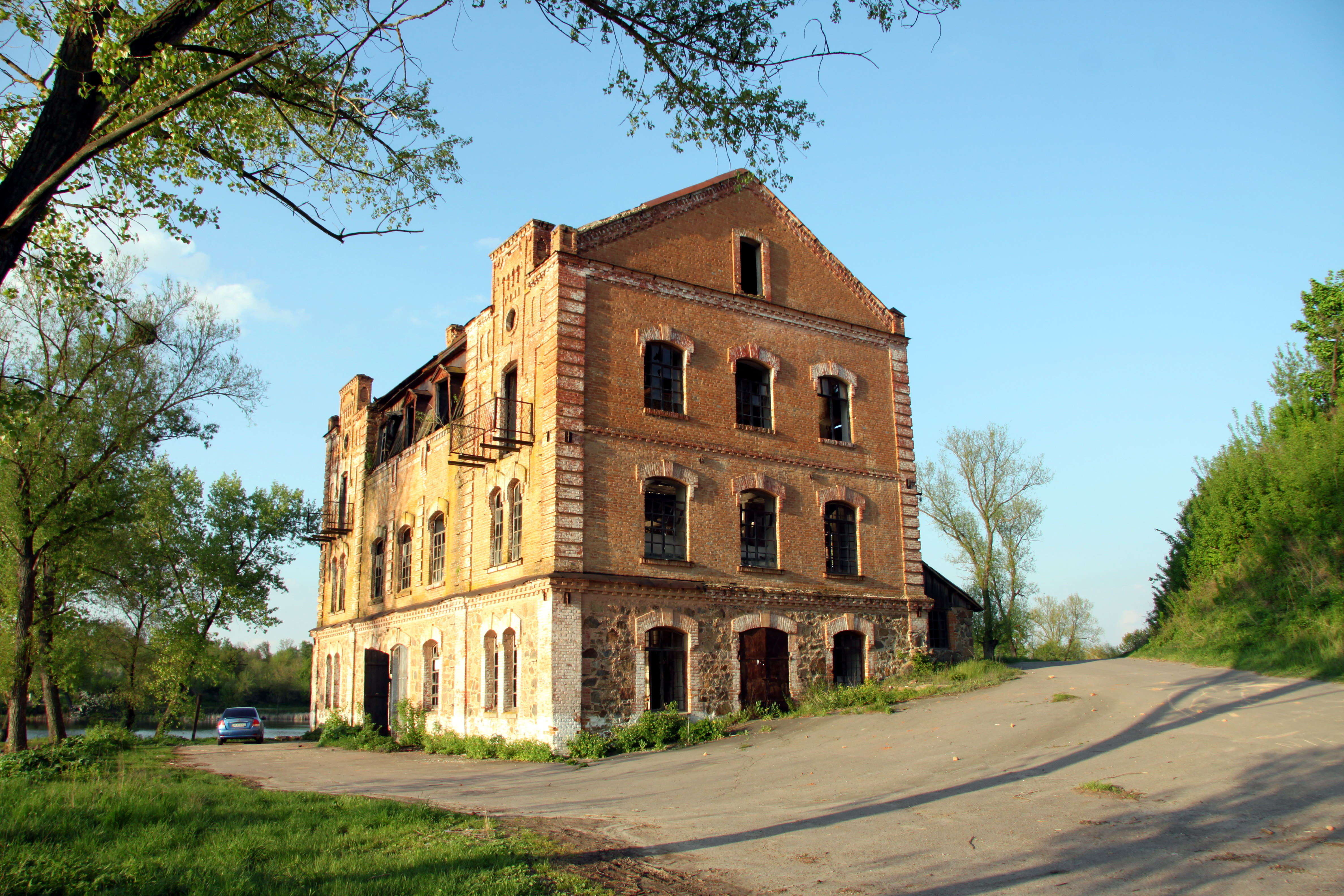 Млин, вул. Центральна, Круподеринці